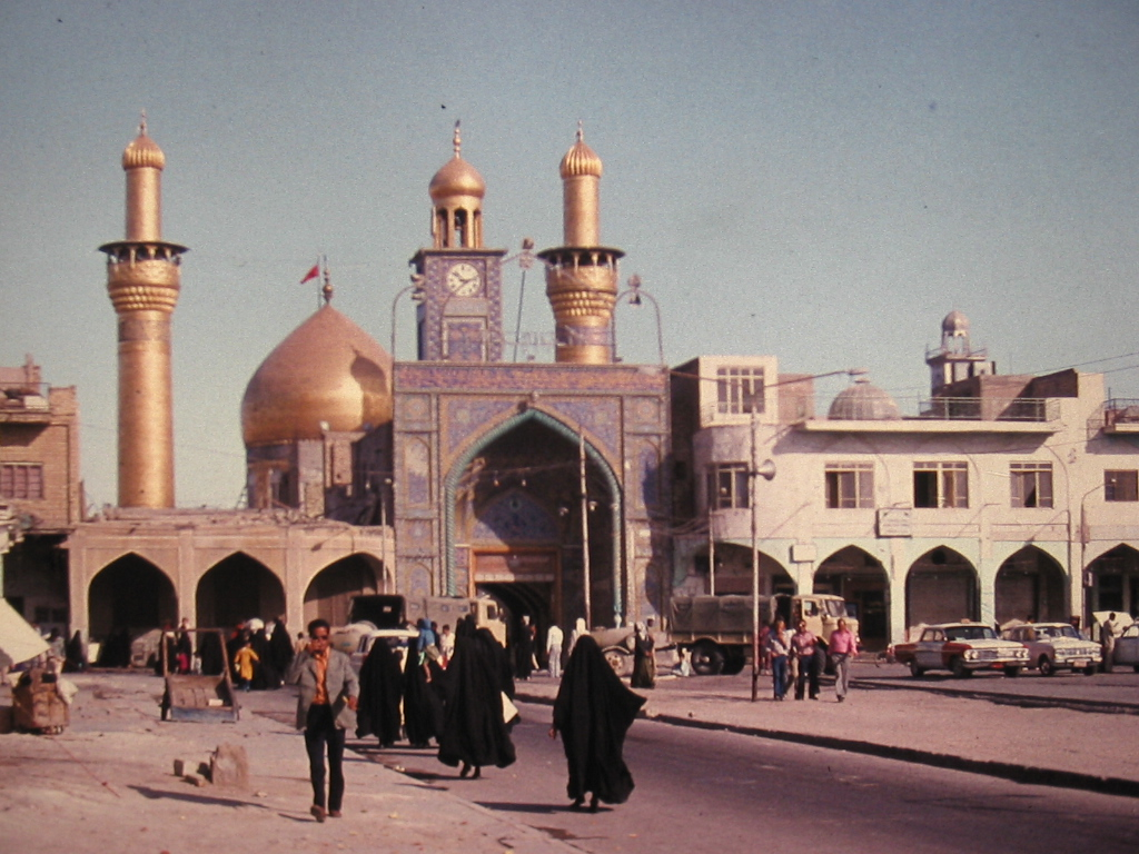 Bildbeschreibung: Moschee in Kerbela, Irak Quelle: Selbst von meinem Dia abfotografiert Datum der Originalaufnahme: Sommer 1975